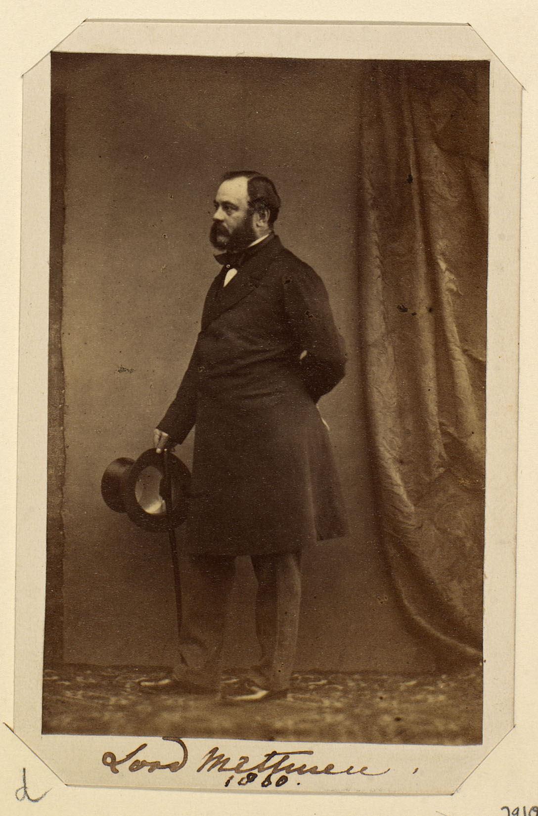 Lord Methuein